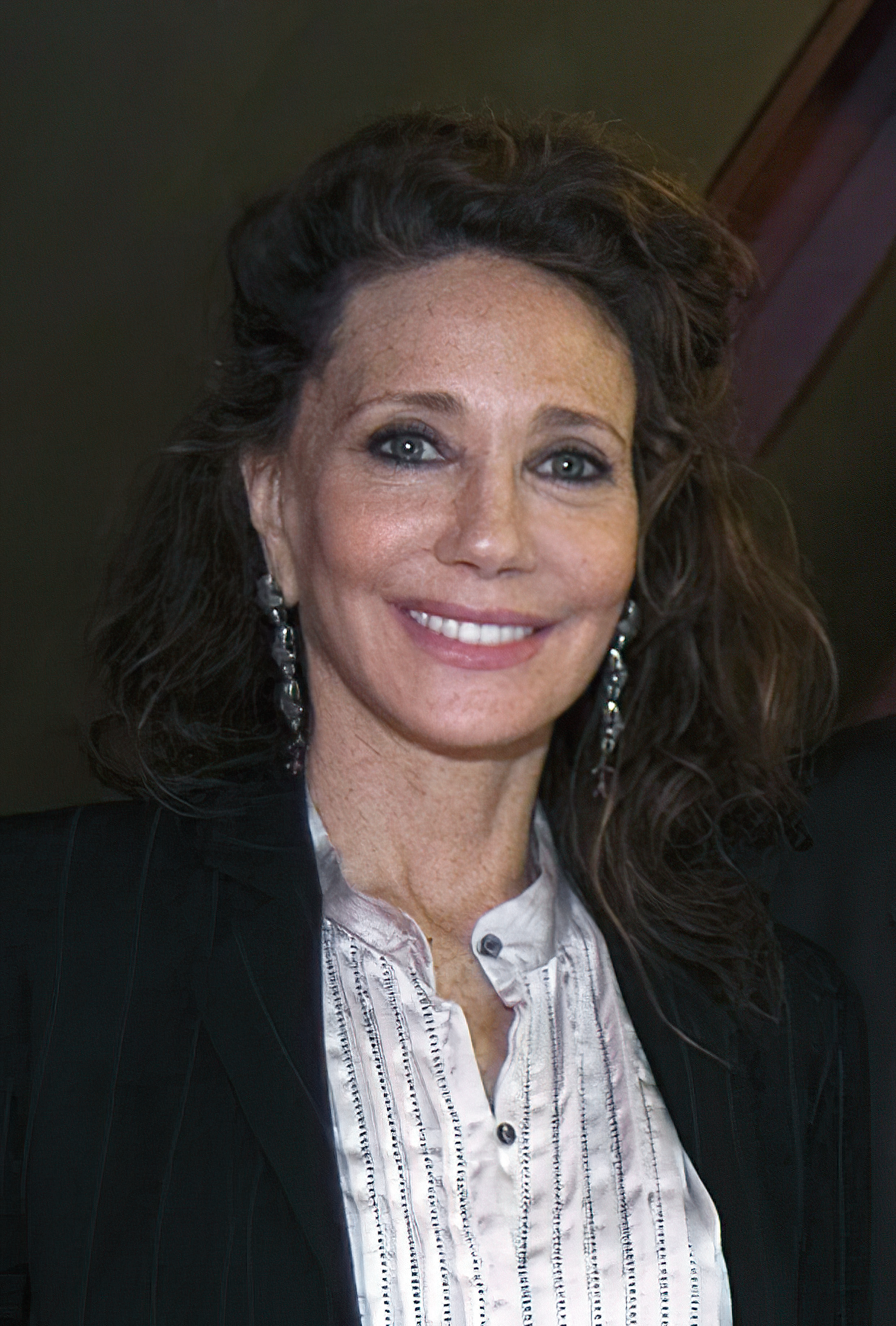 MARISA BERENSON, Marraine du Comité de Soutien Clic sur la Bible. Actrice et ambassadrice de l'UNESCO